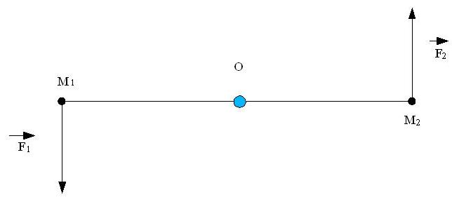 Représentation d'un couple de force. Licensing Catégorie:Schéma de physique